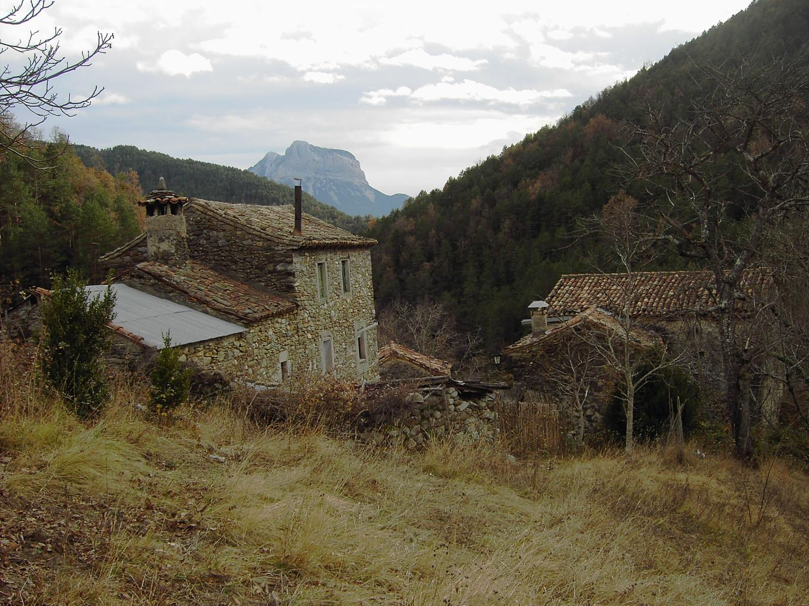 El caserío de Estaroniello (Valle de Tella, Huesca), con la Peña Montañesa de fondo.